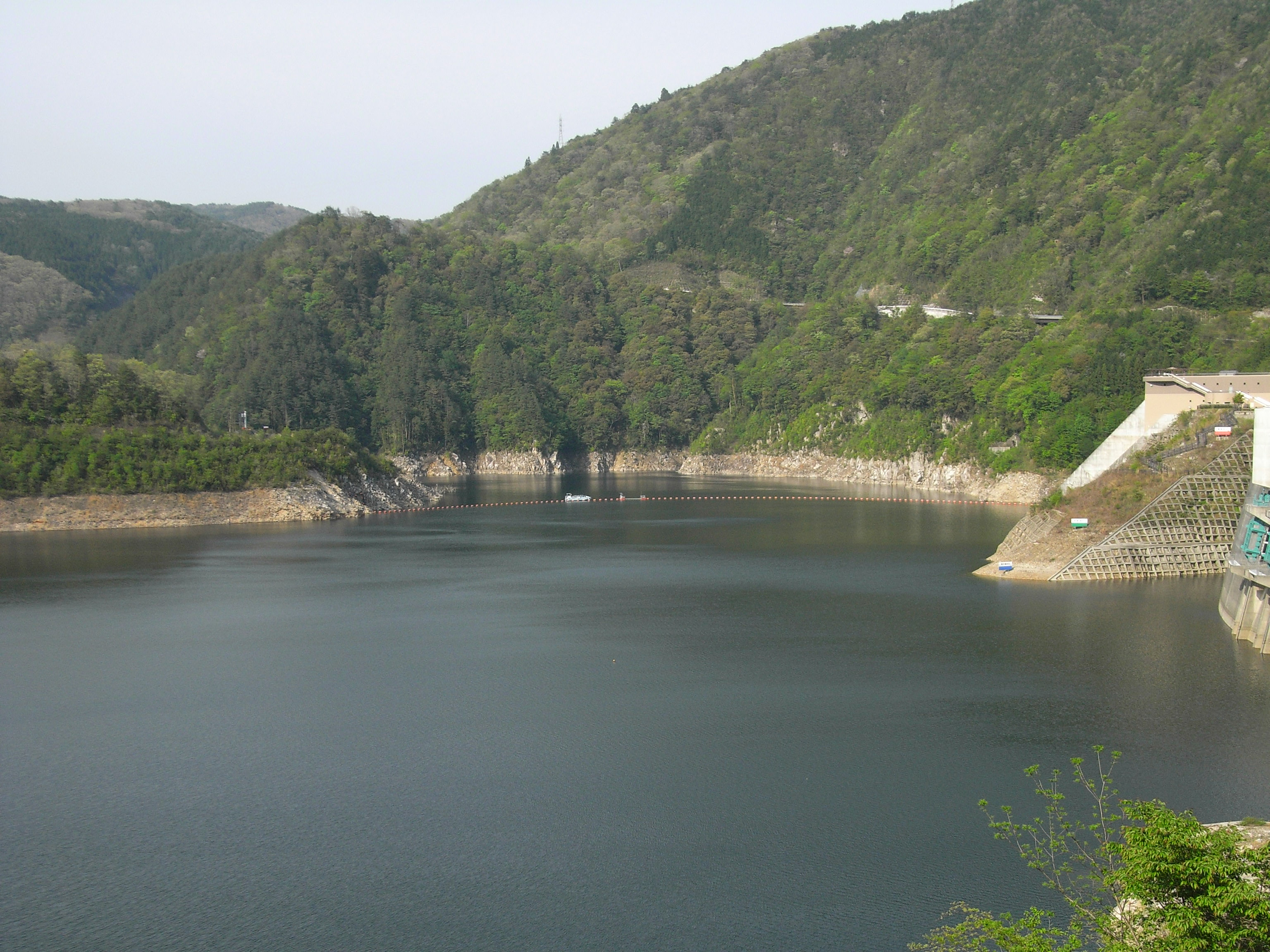 Lake